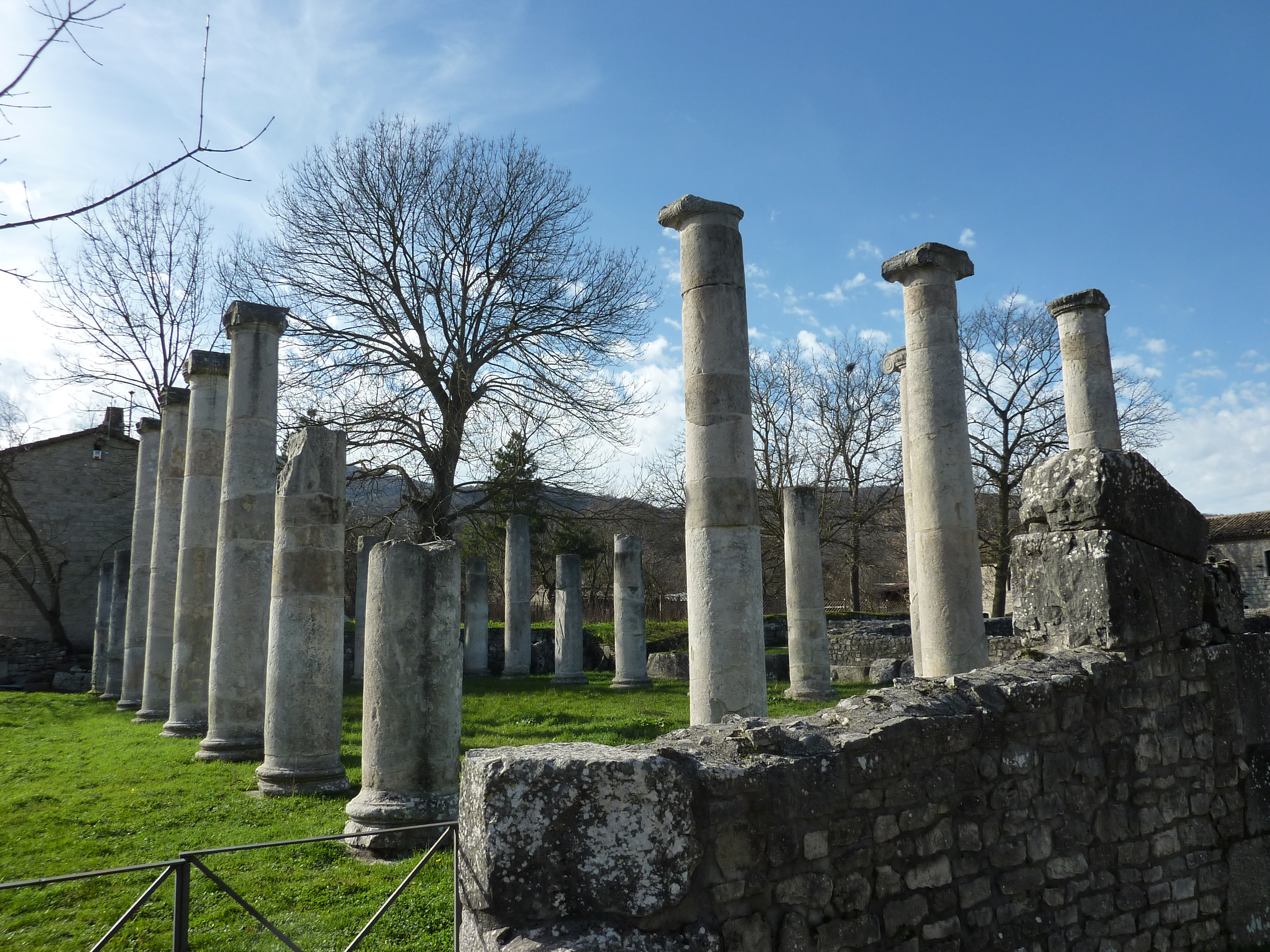 Altilia, Sepino - Basilica